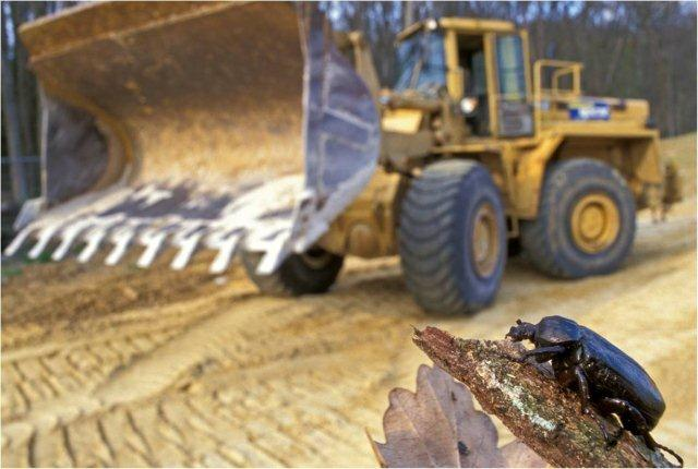 Chargeur DTP